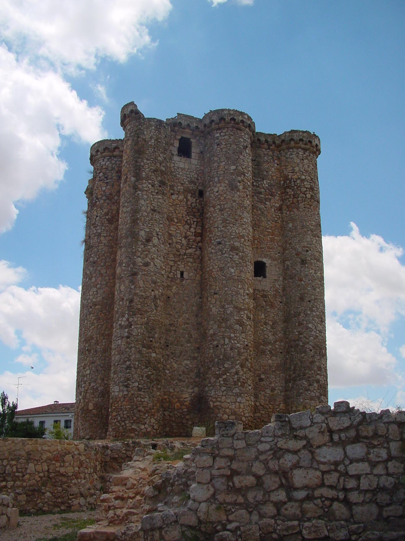 Torre de mampostería de Villarejo de Salvanés.